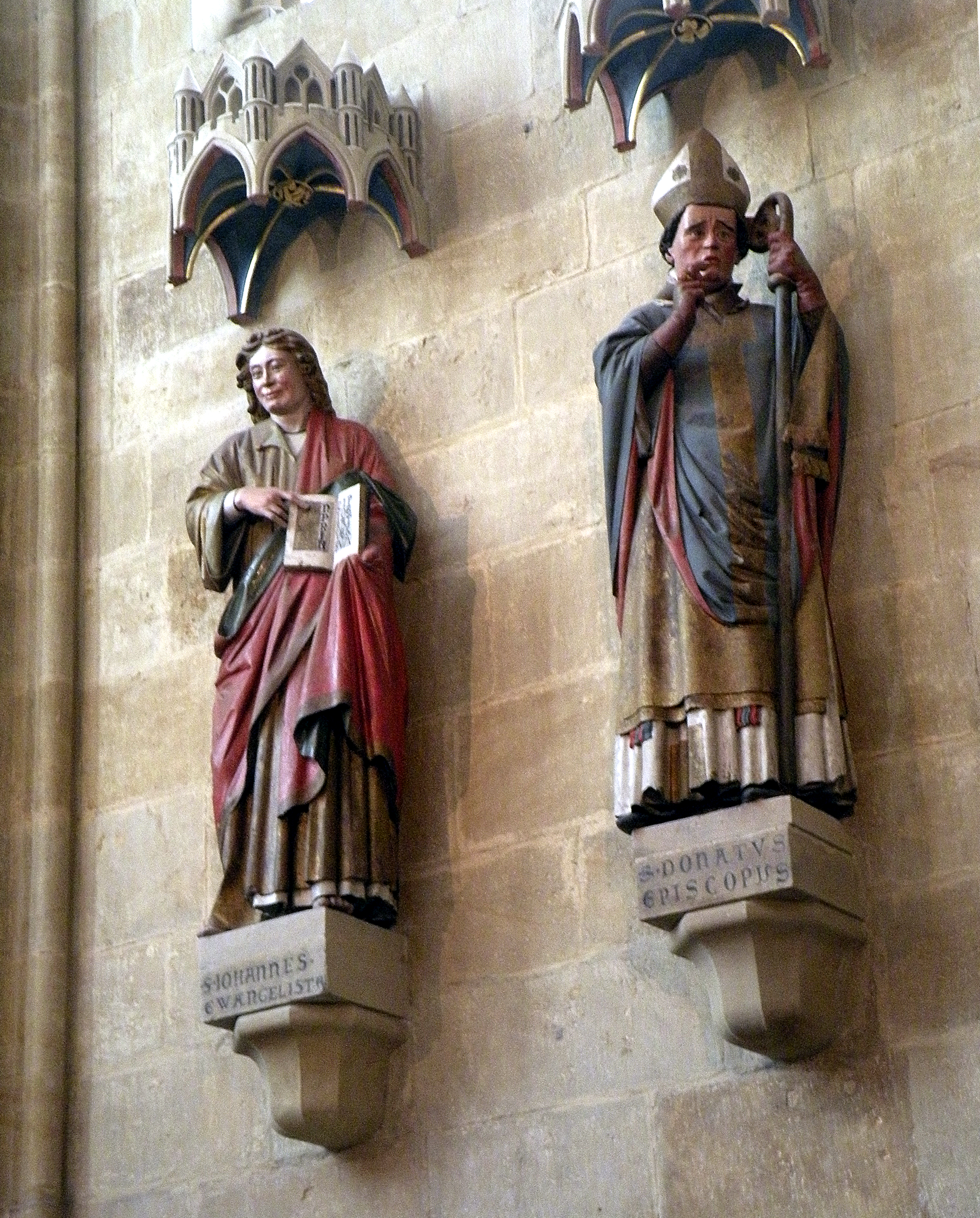 Иоанн Богослов и св.епископ Донат. Мейсен.Дом.